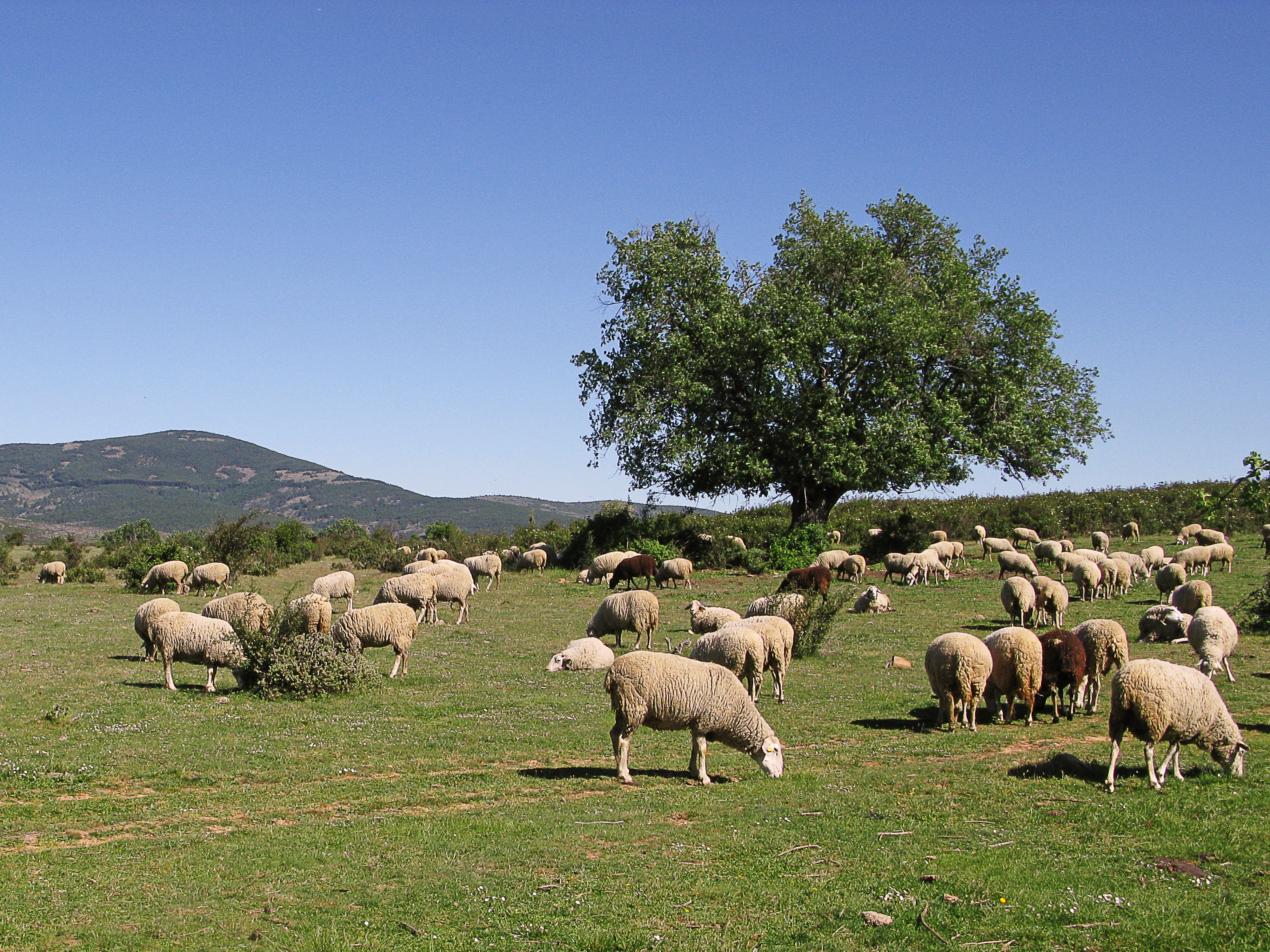 Zona noroeste de la provincia de Guadalajara, dentro de la topografía de la provincia denominada la Sierra del Robledal, en pleno corazón de la ruta de los Pueblos Negros o de la Arquitectura Negra (llamada así por la construcción en pizarra de sus casas) y del Parque Natural de la Sierra Norte de Guadalajara